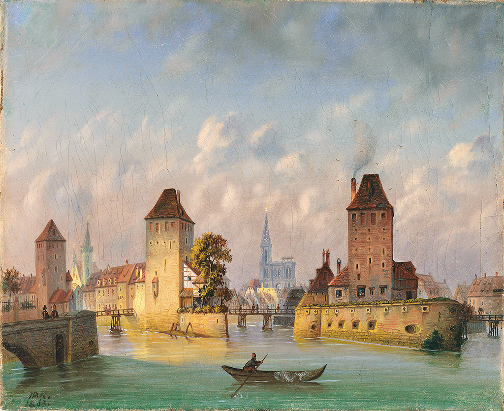 Die gedeckten Brücken in Straßburg, datiert 1863, Öl auf Leinwand, 21,5 x 26 cm